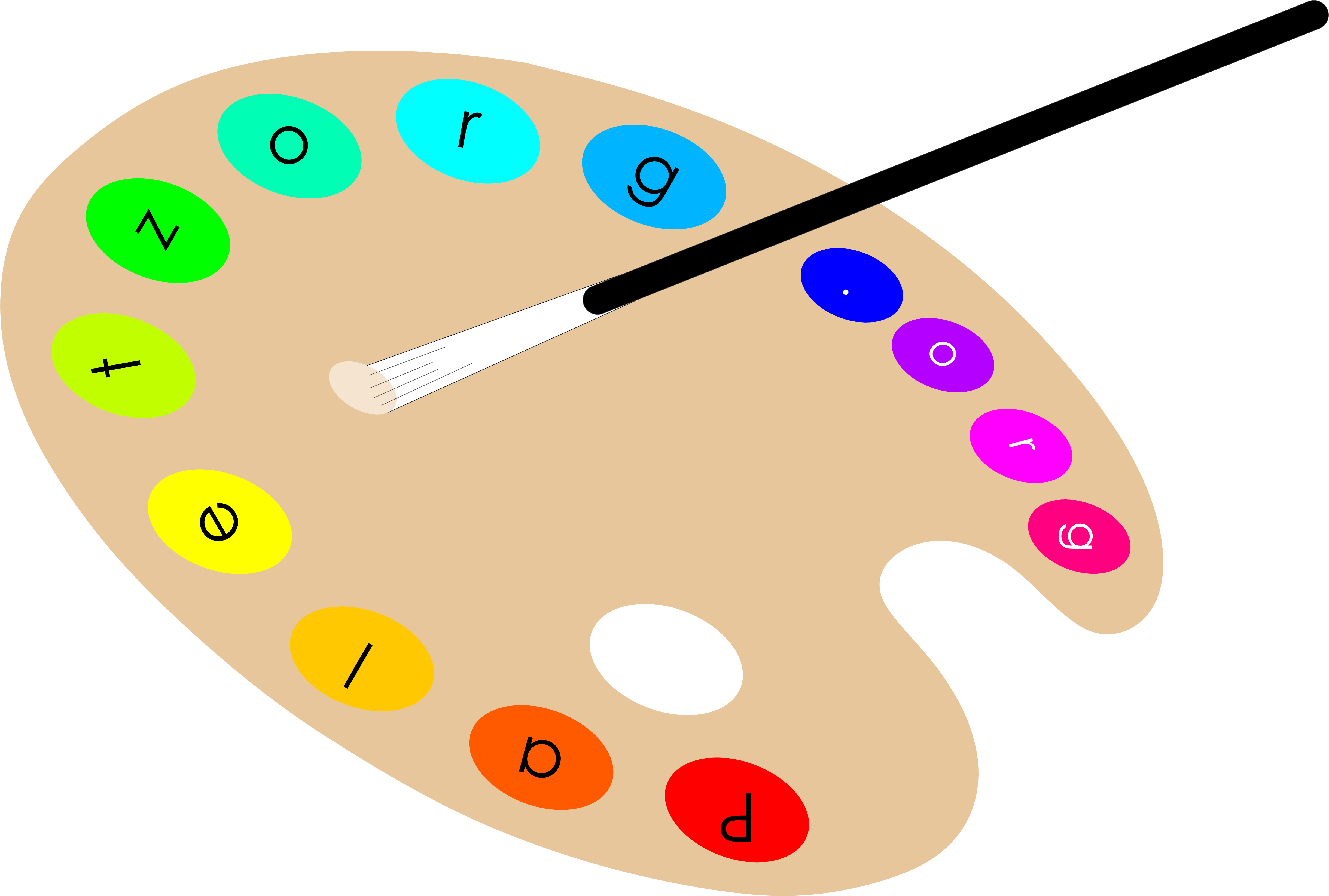 Het logo van Paletzorg